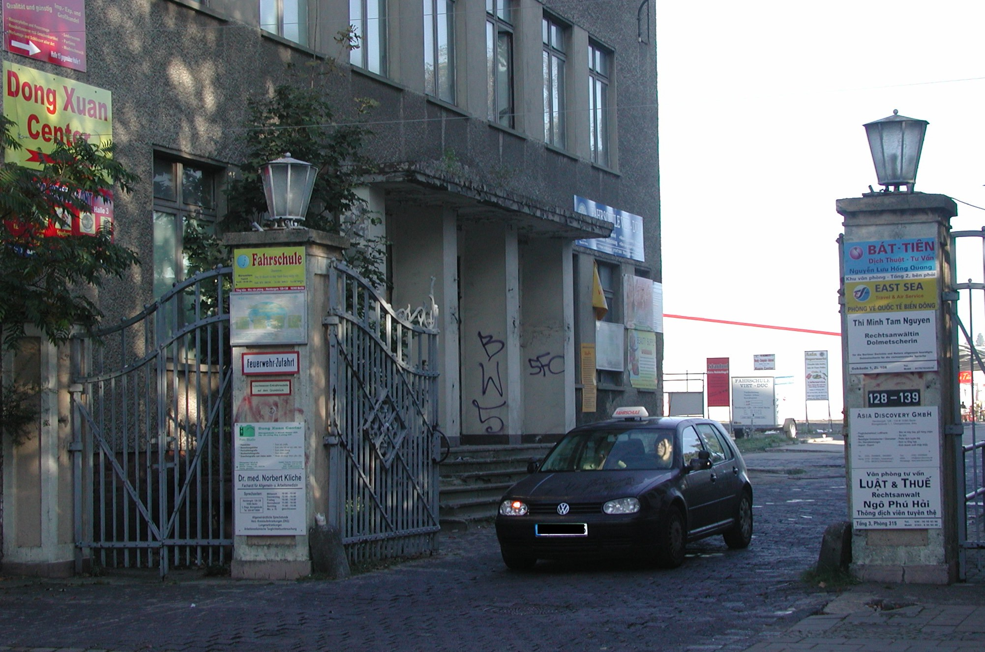 Gebäude des VEB Elektrokohle in der Herzbergstrasse